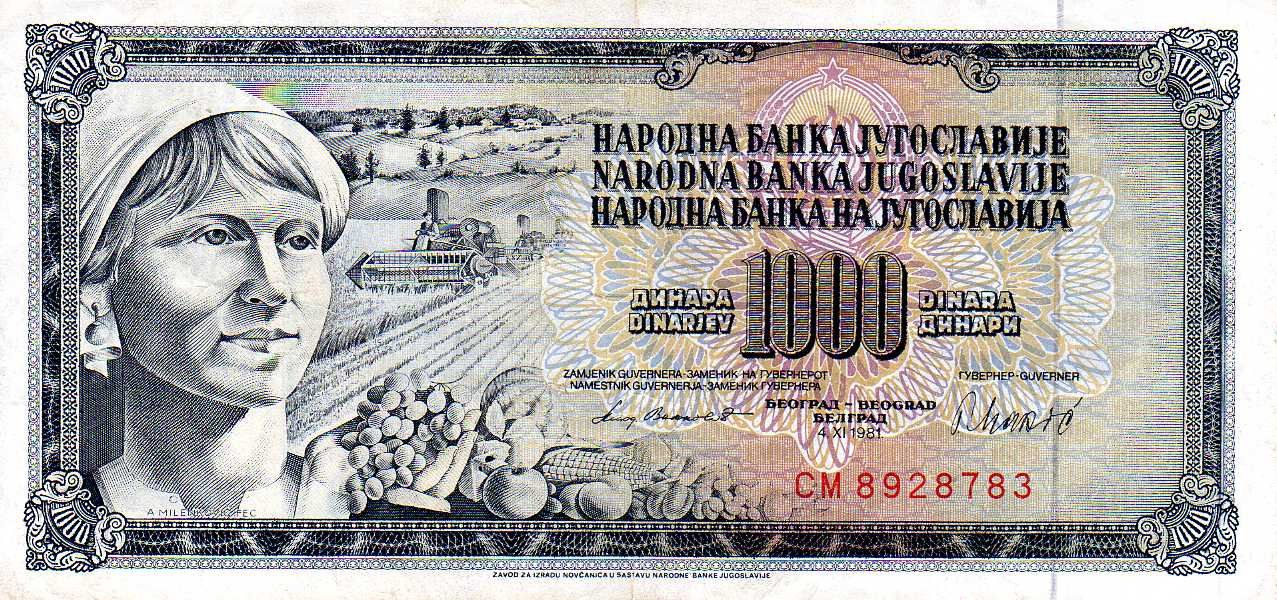 1000 Yugoslav dinar (1981) - obverse